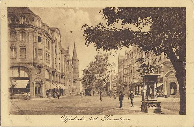 Wettersäule in Offenbach am Main Kaiserstraße/Frankfurter Straße